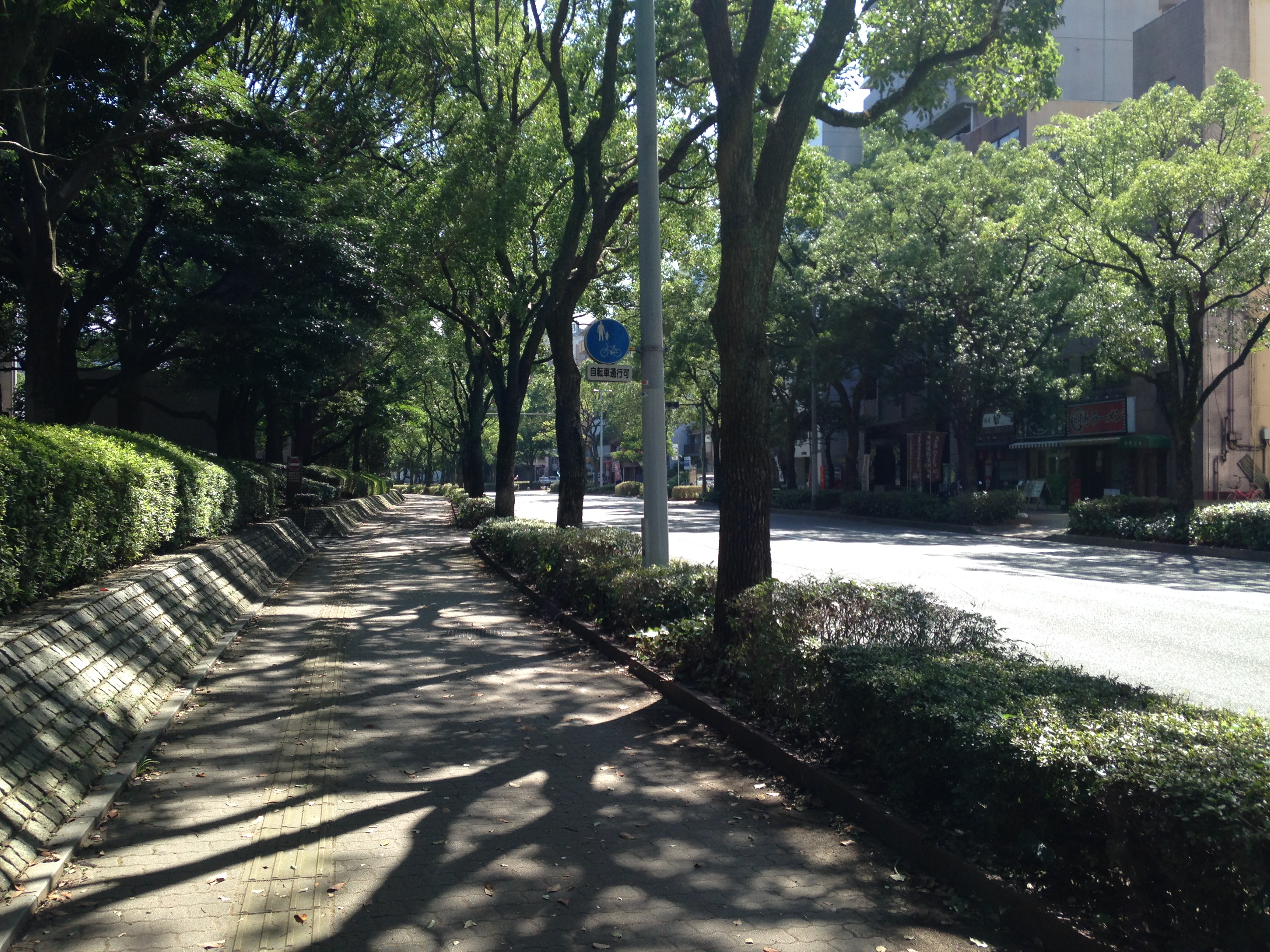 福岡県庁舎西側の福岡県道21号